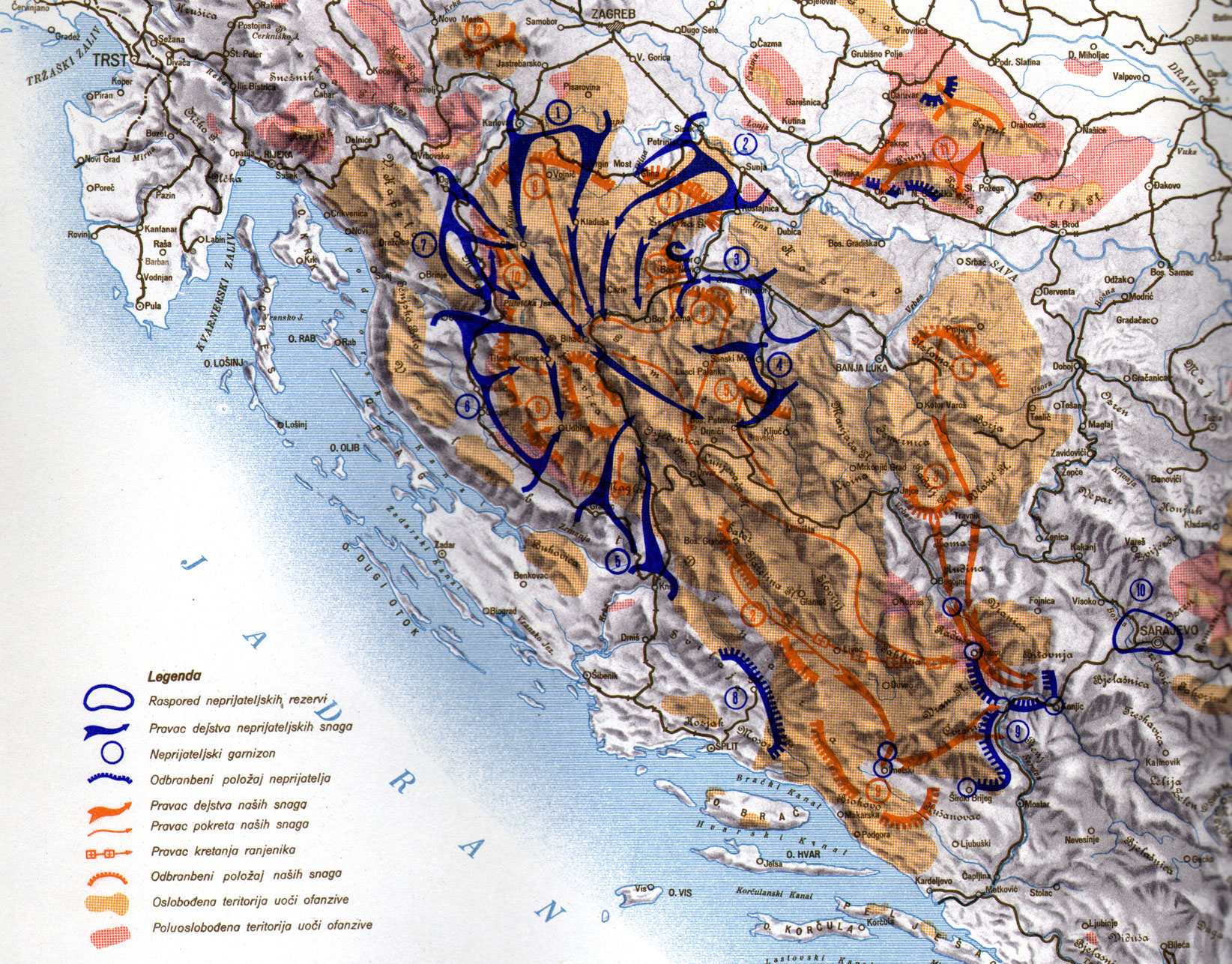 Srpskohrvatski / српскохрватски: Četvrta neprijateljska ofanziva i protivofanziva NOV Jugoslavije (prva faza) (od 20 januara do 25 februara 1943 godine